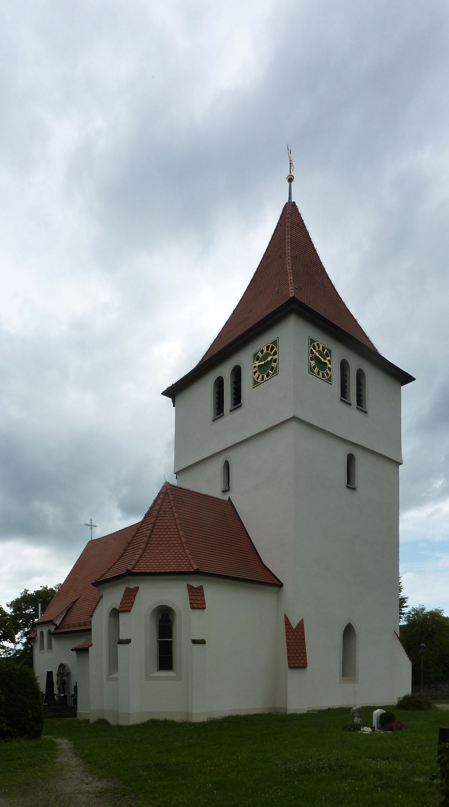 evangelische Margaretenkirche in Salach, vom Friedhof aus gesehen.